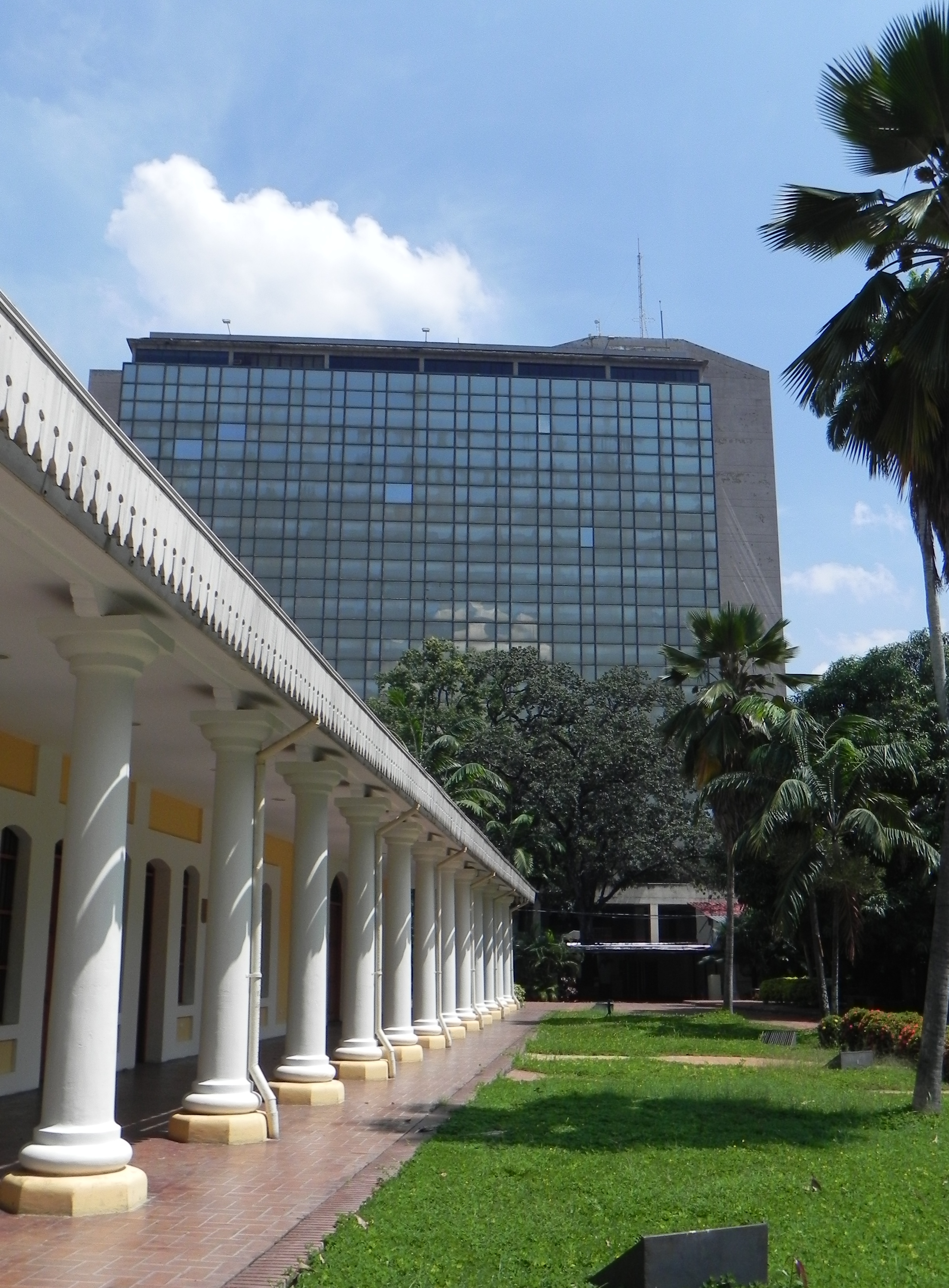 Torre Banaven, en la Av. Bolívar Norte